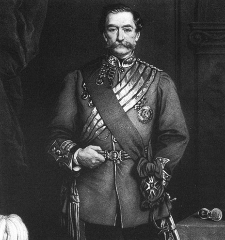 Robert Napier, 1st Baron Napier of Magdala Från